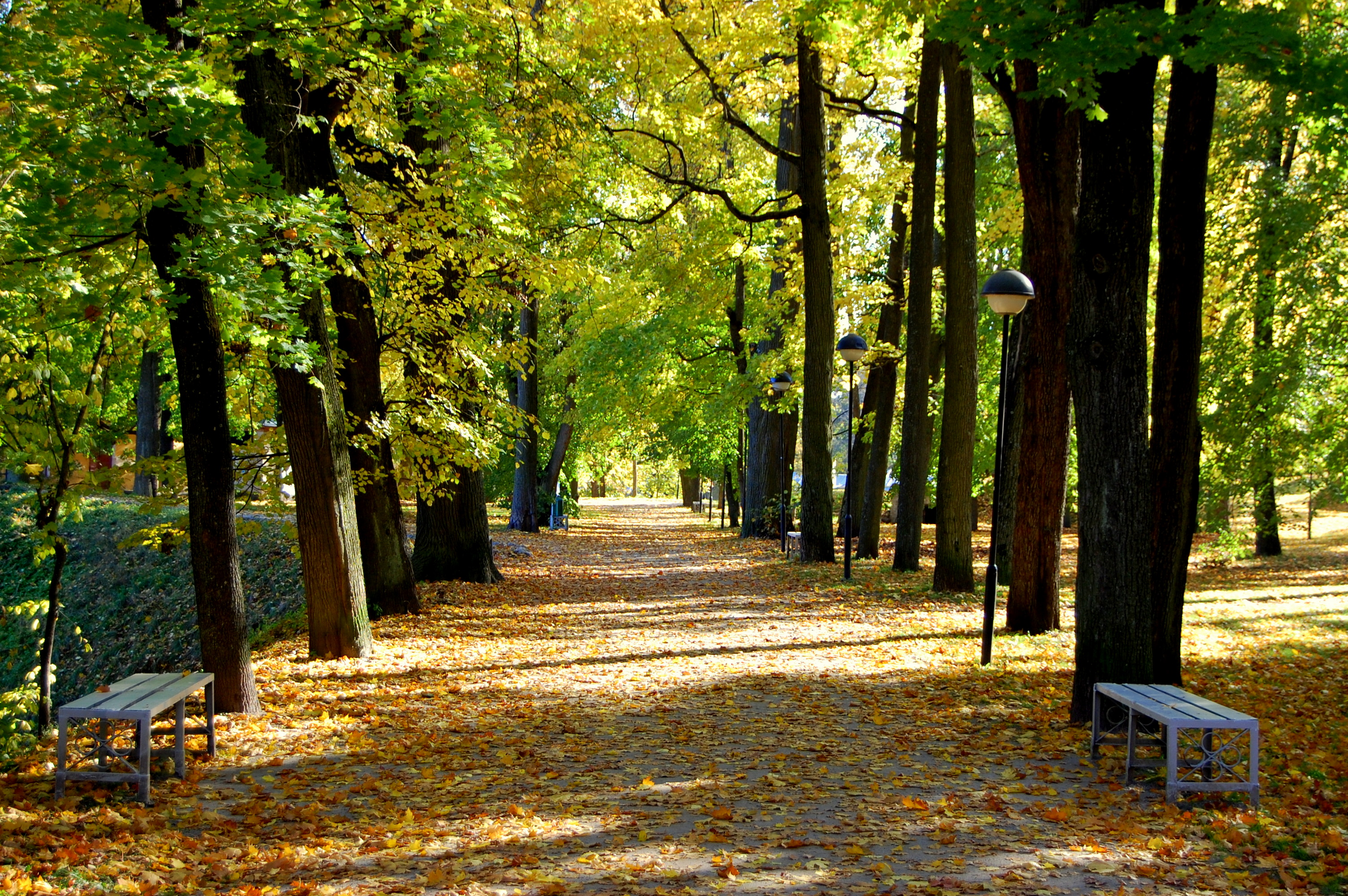 Sügisene Toomemägi